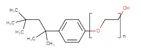 triton